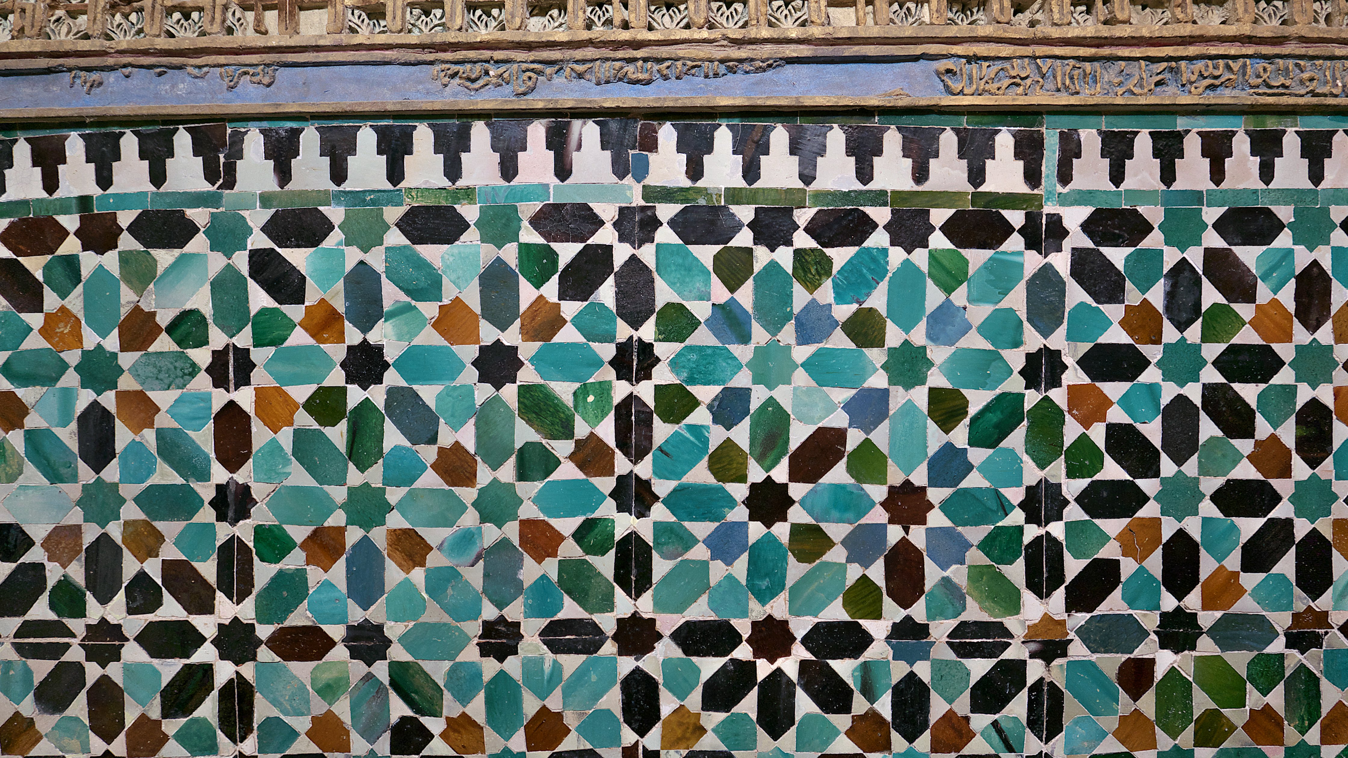 Alicatados mudéjares en la capilla funeraria.